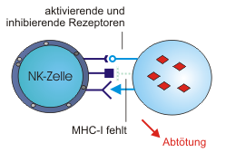 Aktivierung der NK-Zelle durch fehlenden MHC-I-Komplex an der infizierten Zelle.